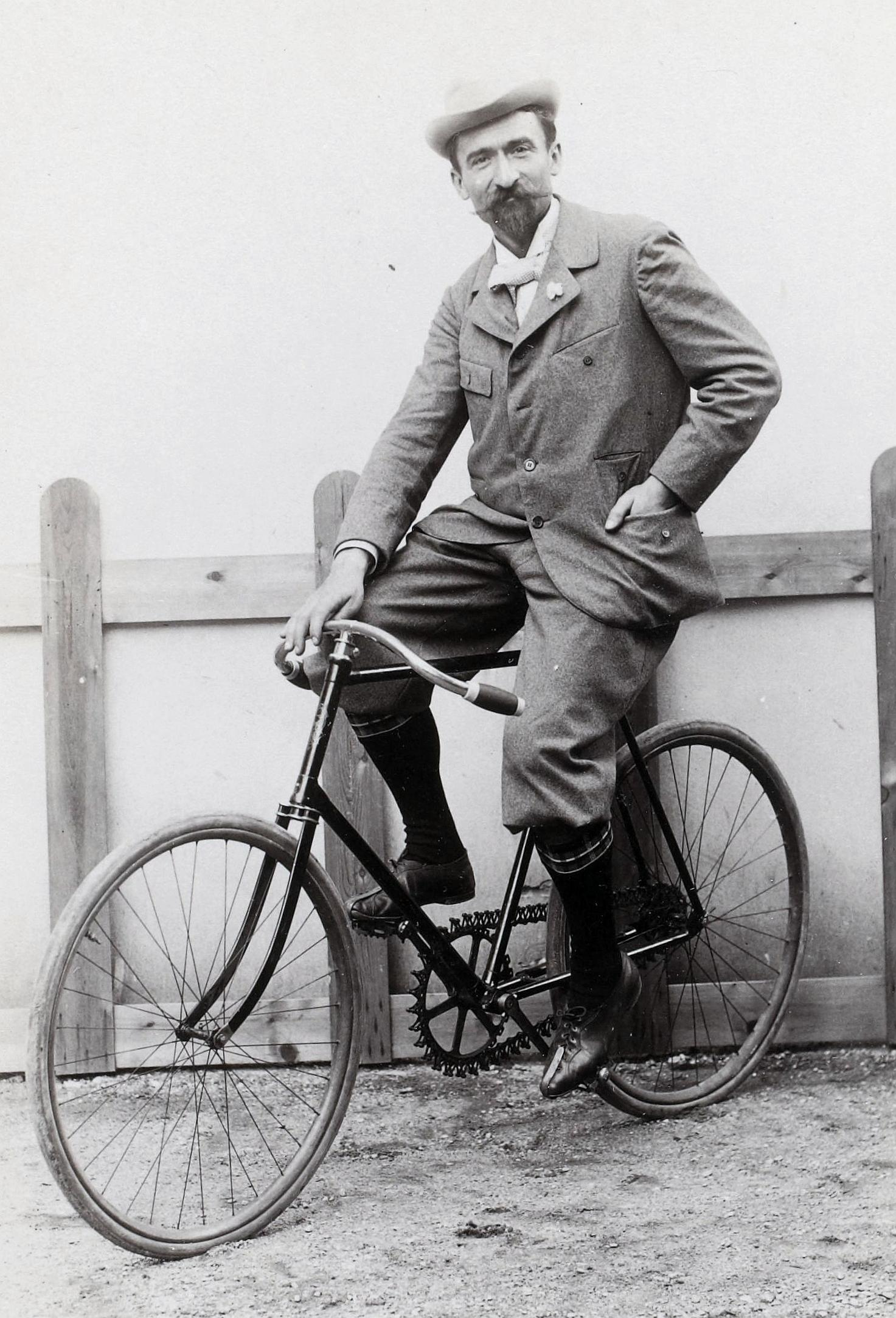 [Collection Jules Beau. Photographie sportive] : T. 5. Années 1897 et 1898 / Jules Beau : F. 19v. Rivierre ; Harry Terrill